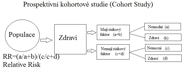 Prospektivní kohortové studie (Cohort Study)